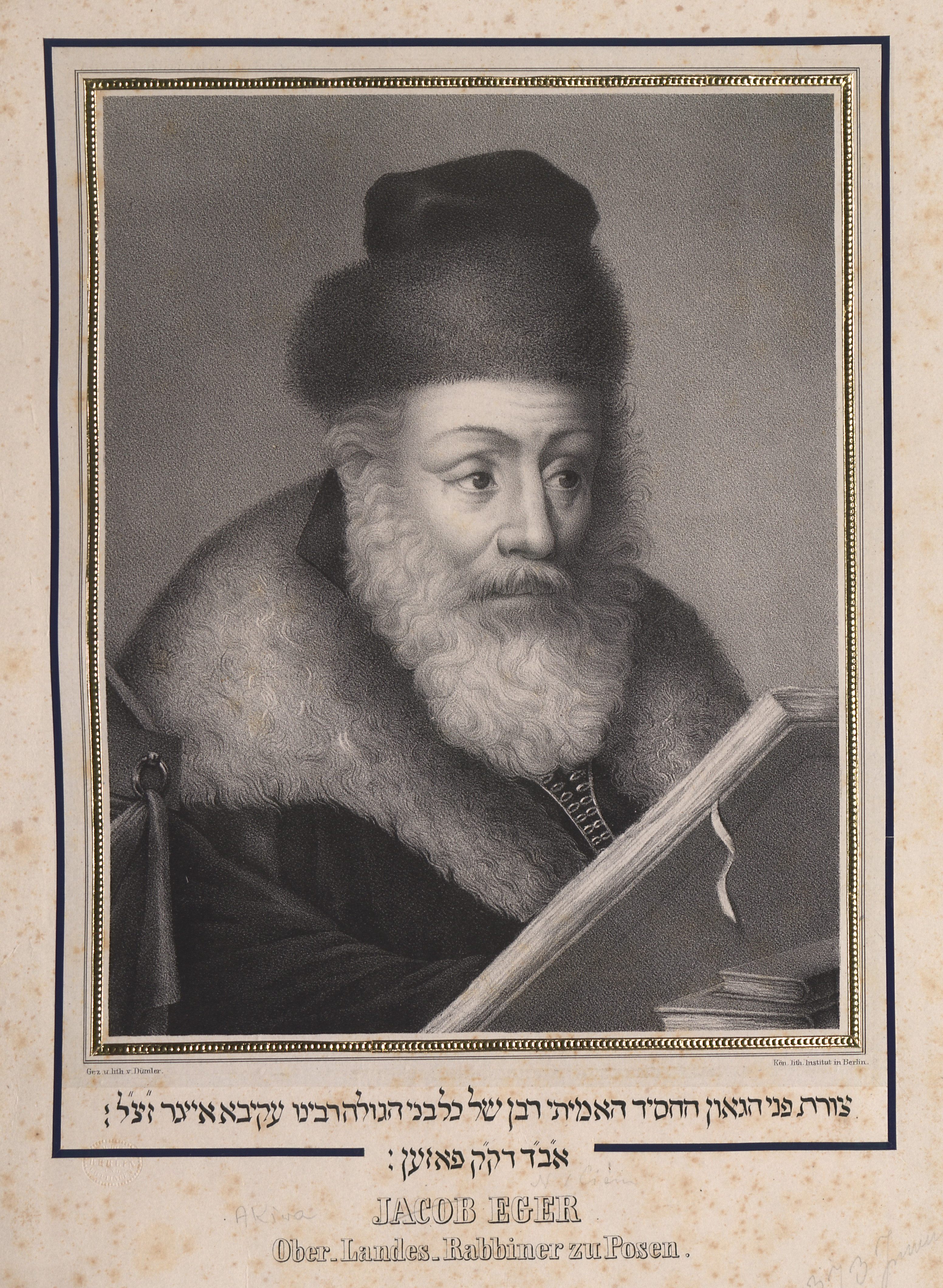 Akiva ben Eger